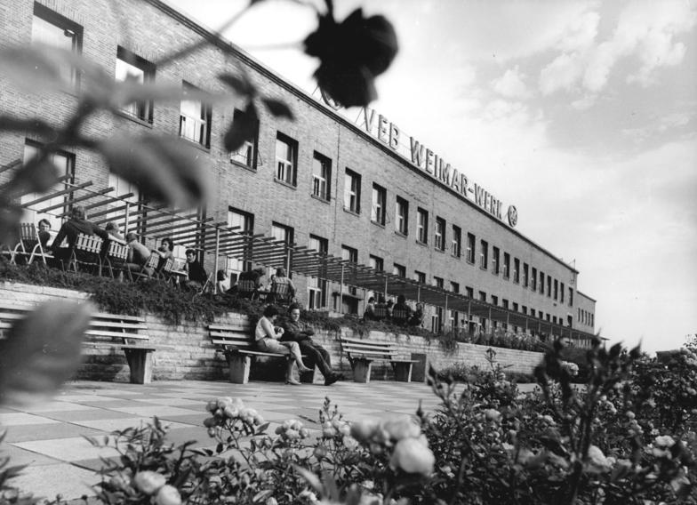 Weimar, VEB Weimar-Werk ADN-ZB Link 30.9.1974-be Bez. Erfurt: Großzügig gestaltete Terrassen und farbenfrohe Blumenrabatten ermöglichen es den Werktätigen des Weimar-Werkes, Stammbetreib des VEB Weimar-Kominetes, ihre Arbeitspausen in angenehmer Umgebung an der frischen Luft zu verbringen. In dem Weimarer Großbetrieb werden vorranigi Kartoffelroder produziert, die auf den Feldern der DDR, der UdSSR, Polens der CSSR, Ungarns, Frankreichs, Englands und der BRD eingesetzt werden.